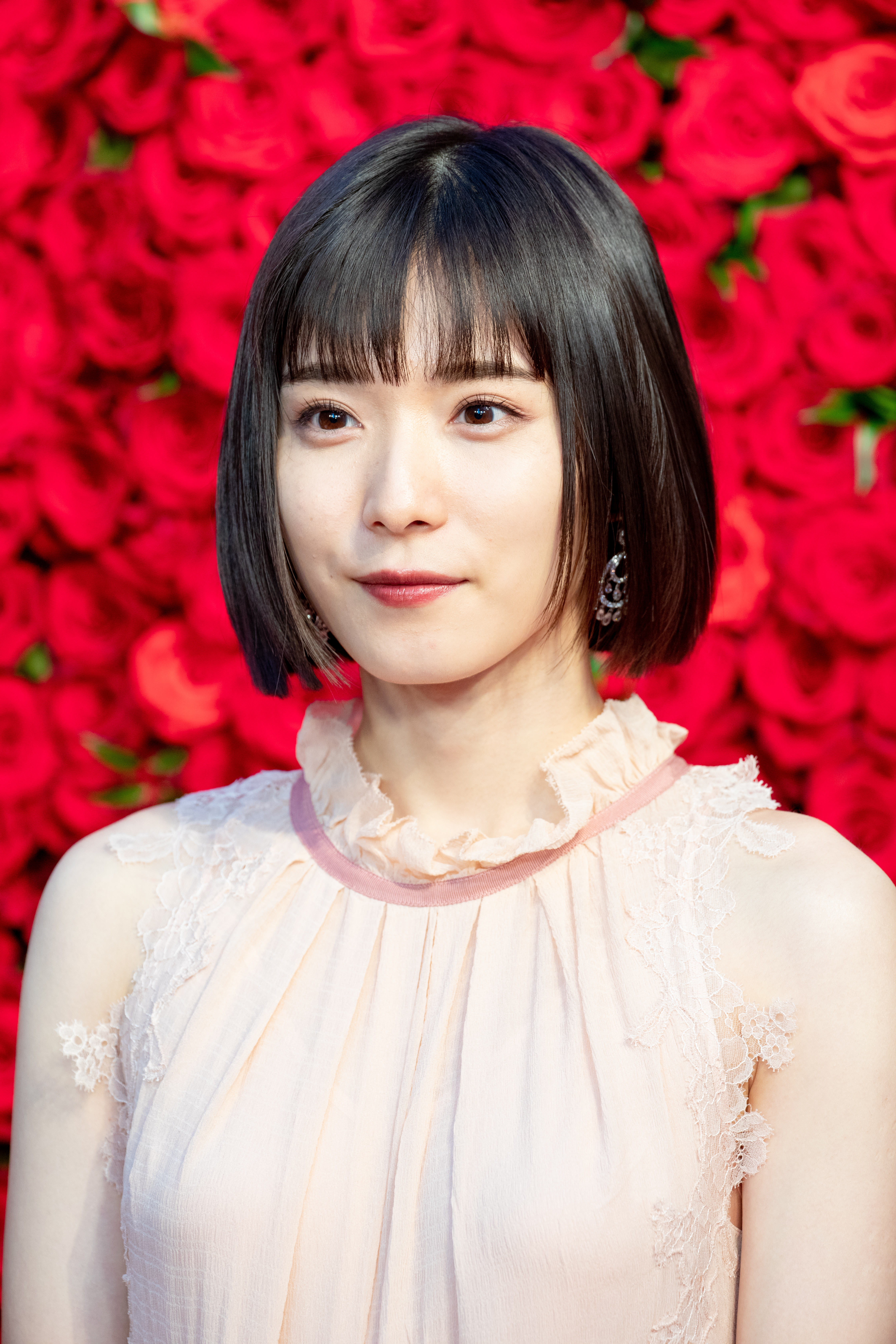 第31回 東京国際映画祭 オープニングセレモニー 松岡茉優